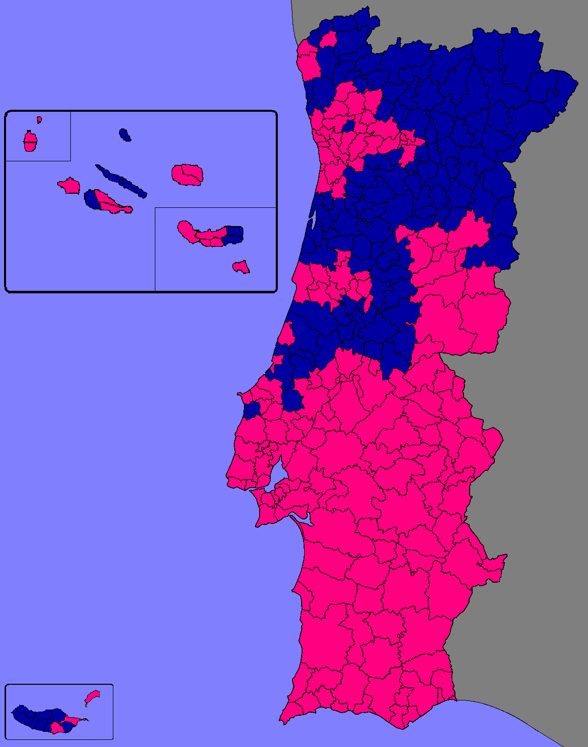 Mapa ilustrativo do candidato mais votado por concelho